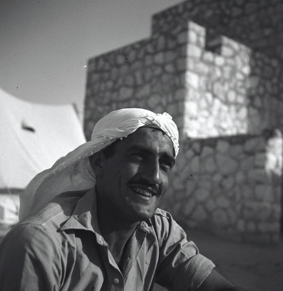 המוכתר בתל-צופים